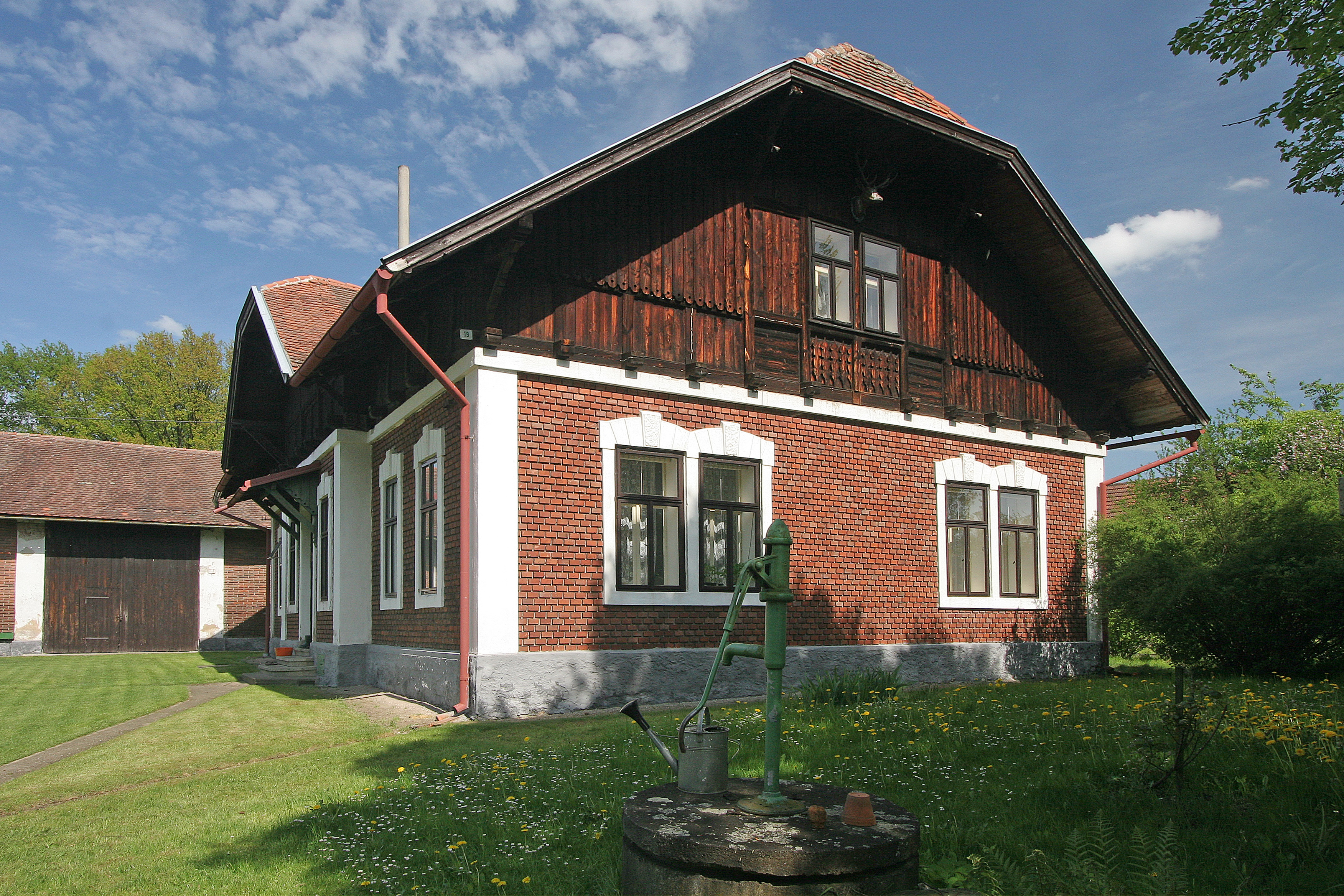 Štít - myslivna čp. 19